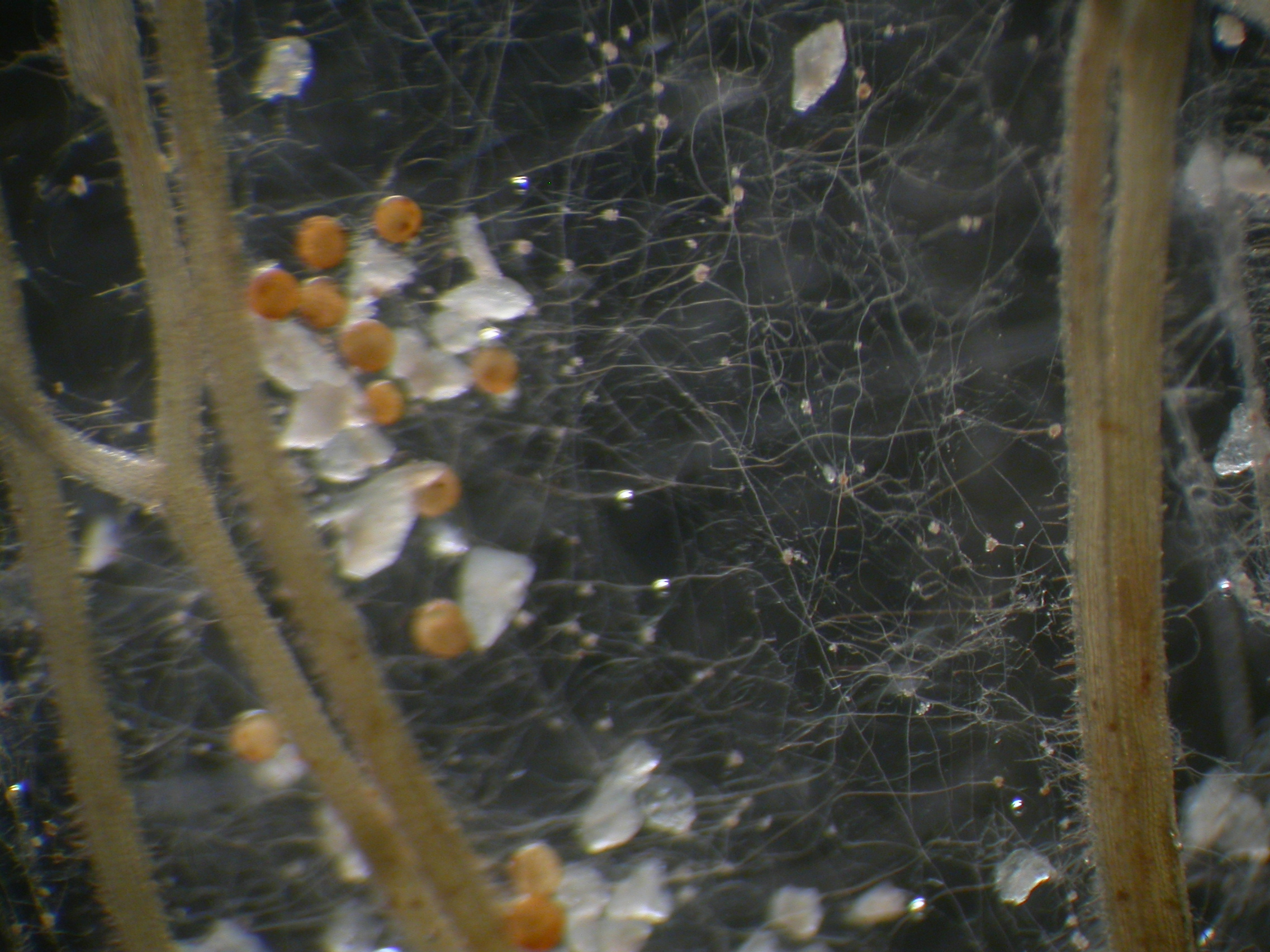 Lotus corniculatus var. japonicus kolonisiert durch Gigaspora margarita